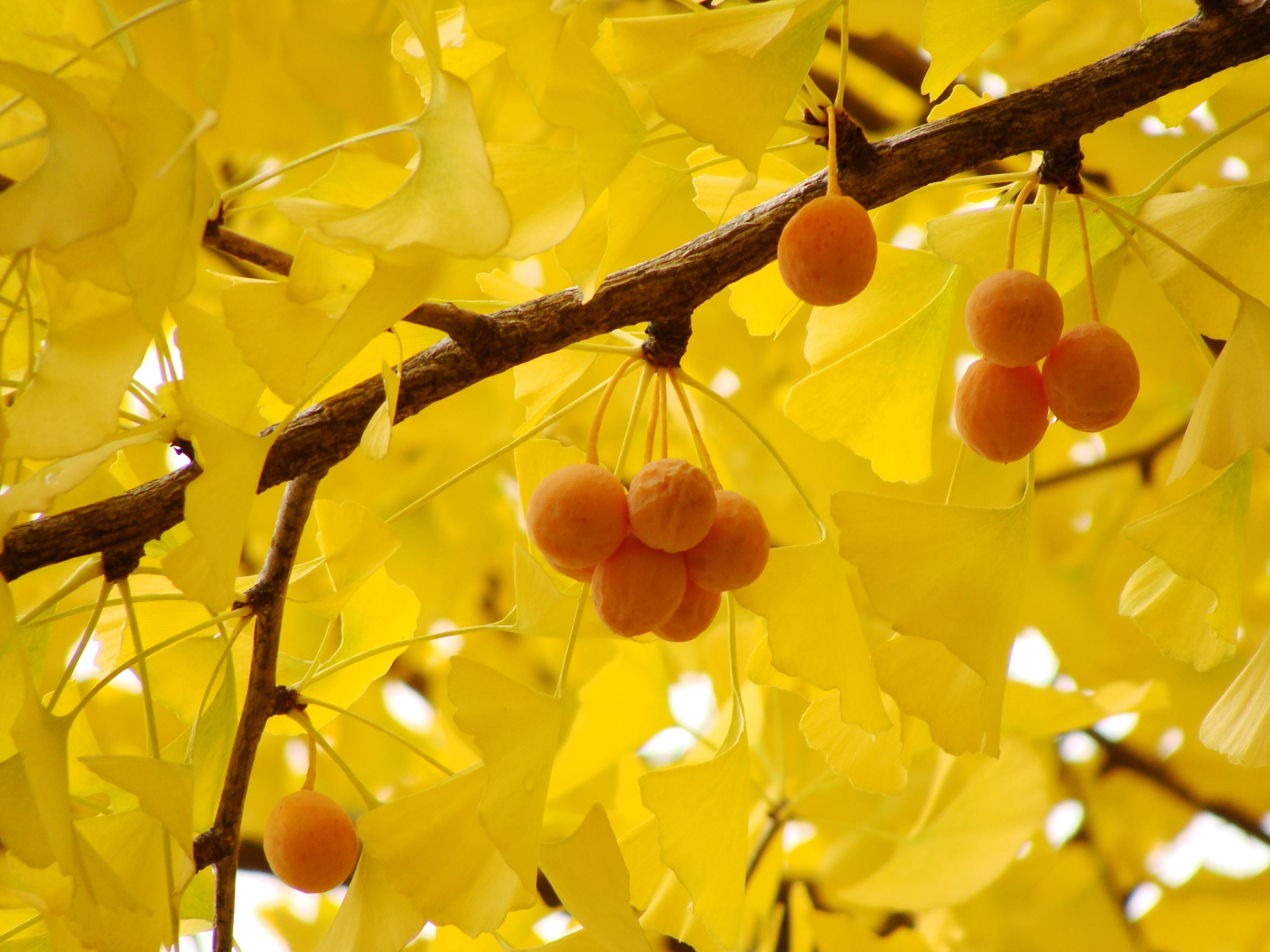 Ginkgo(Japan)